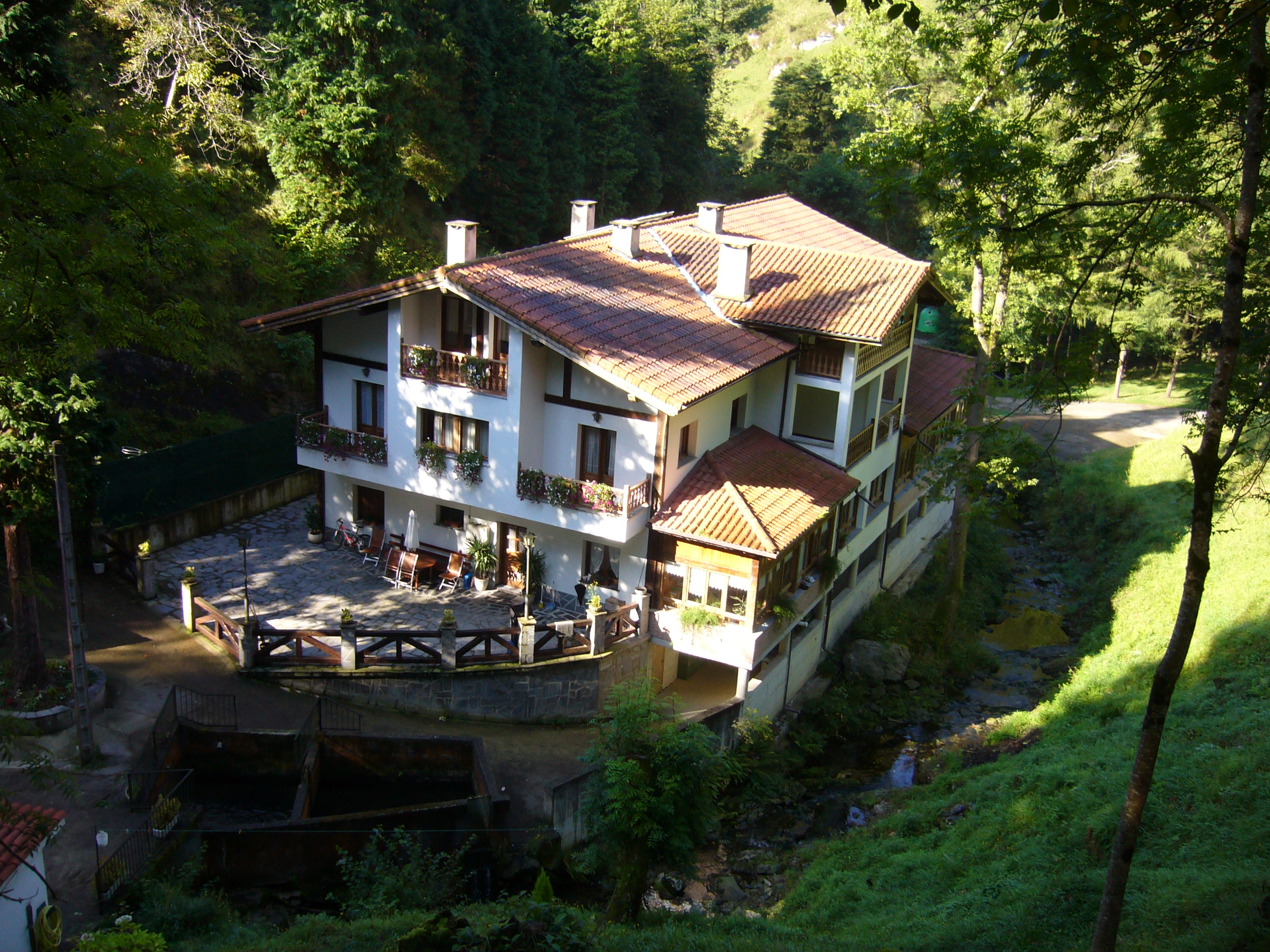 Granada baserria. Errezil (Gipuzkoa)